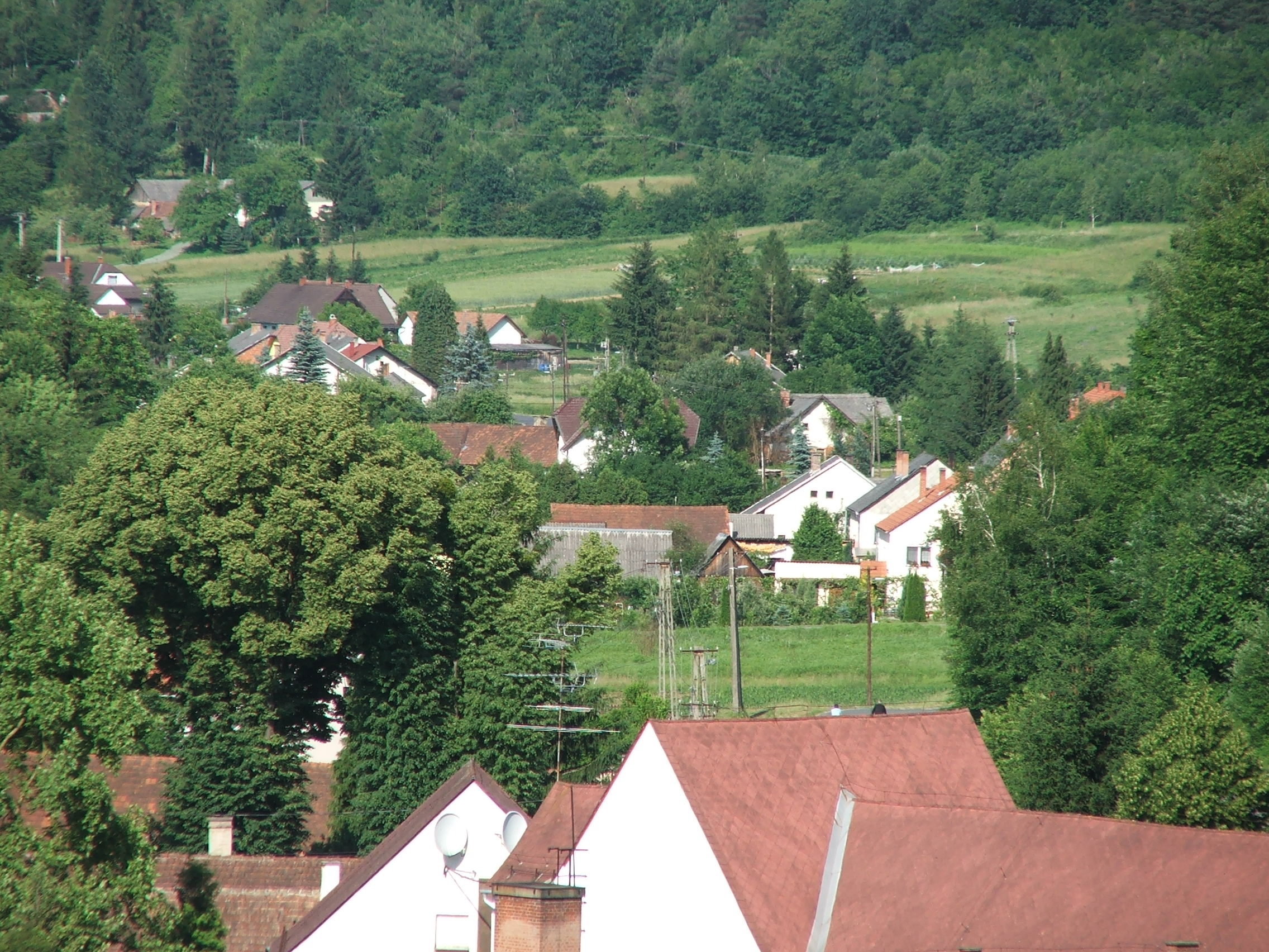 Felsőszölnök völgyben fekvő házai (Vas megye)